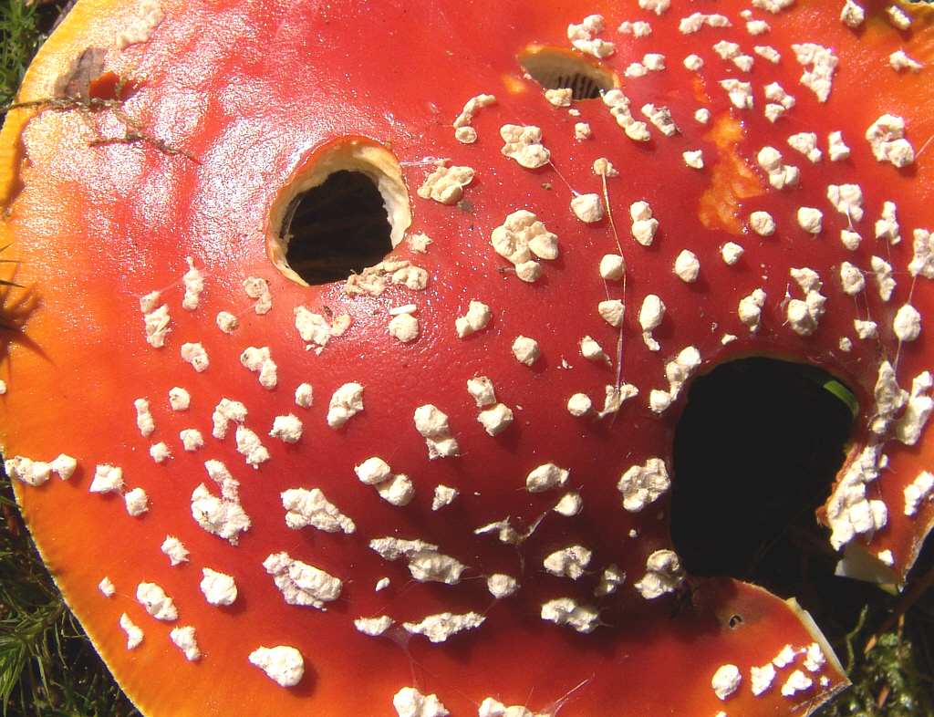 Schneckenfraßstellen an einem Fliegenpilz-Hut (Amanita muscaria)